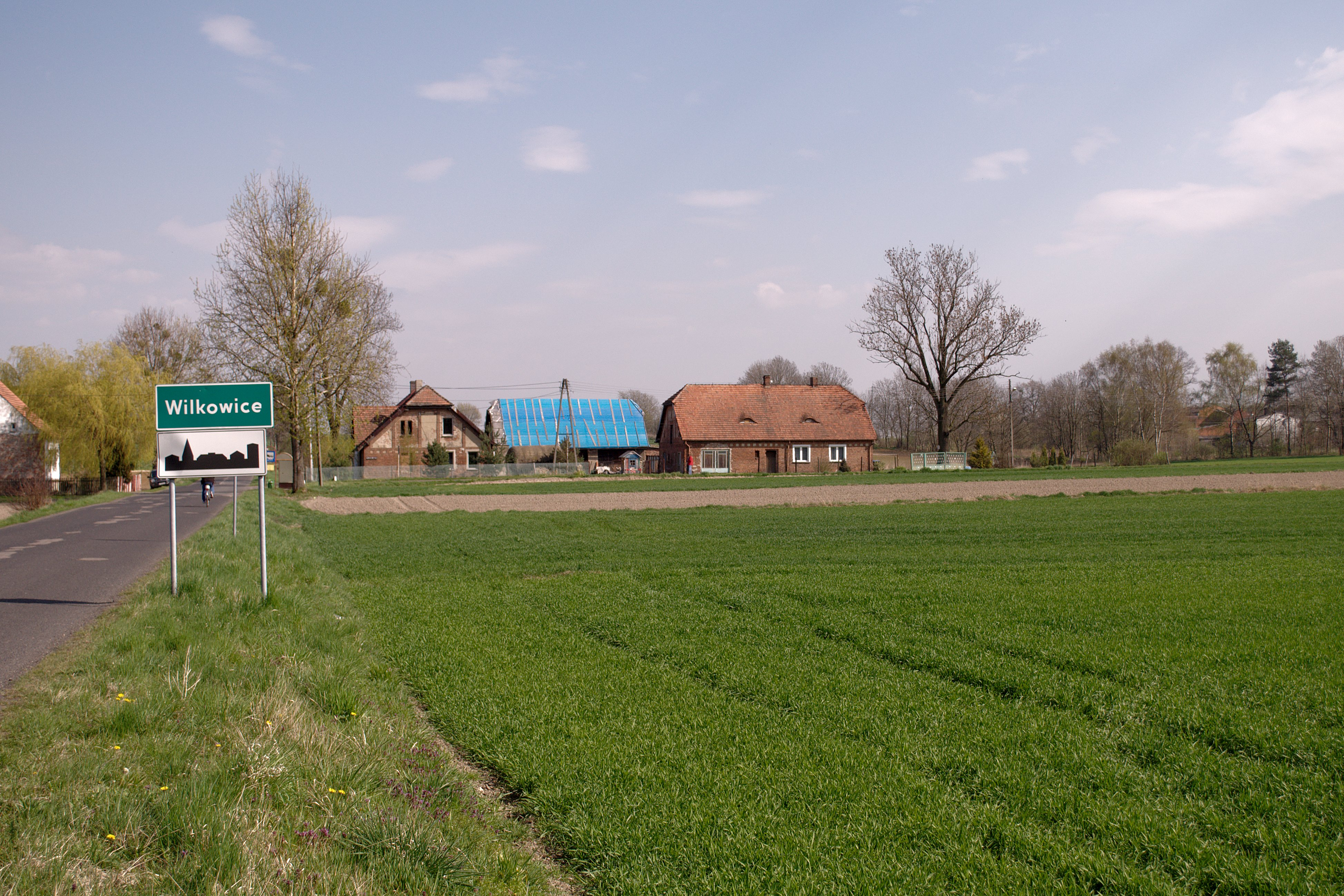 Wilkowice.